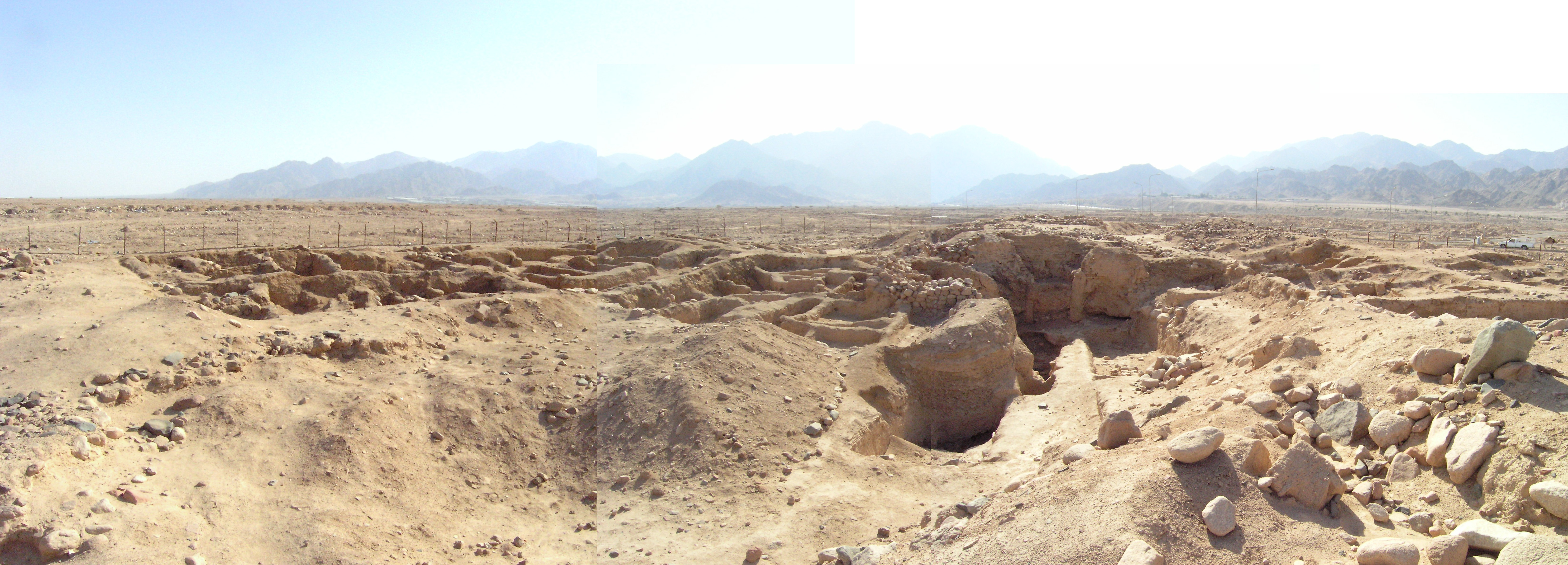 Nördlicher Teil der Ausgrabungen auf dem Tall Hujayrat al-Ghuzlan, Jordanien